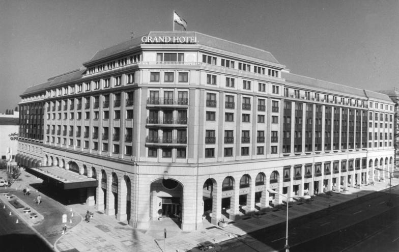 Berlin, "Grand Hotel" ADN-ZB Deutsche Demokratische Republik 12.8.87 me. Grand-Hotel Berlin. Nach zweijähriger Bauzeit wurde das Grand-Hotel in der Berliner Friedrichstraße am 1.8.1987 eröffnet. Zu den 600 Betten in 350 stilvoll möblierten Zimmern, Appartements und Suiten gesellt sich ein Gaststättenangebot, das vom großen Hotelrestaurant bis zu den intimen, nur 20 Plätze zählenden "Wintergarten" reicht. 14 Restaurants, Cafés, Bars und Salons mit 950 Plätzen im Sommer und 850 Plätzen im Winter stehen den Gästen zur Verfügung. Reporter: Junge Copyright: ADN-Zentralbild Berlin-DDR